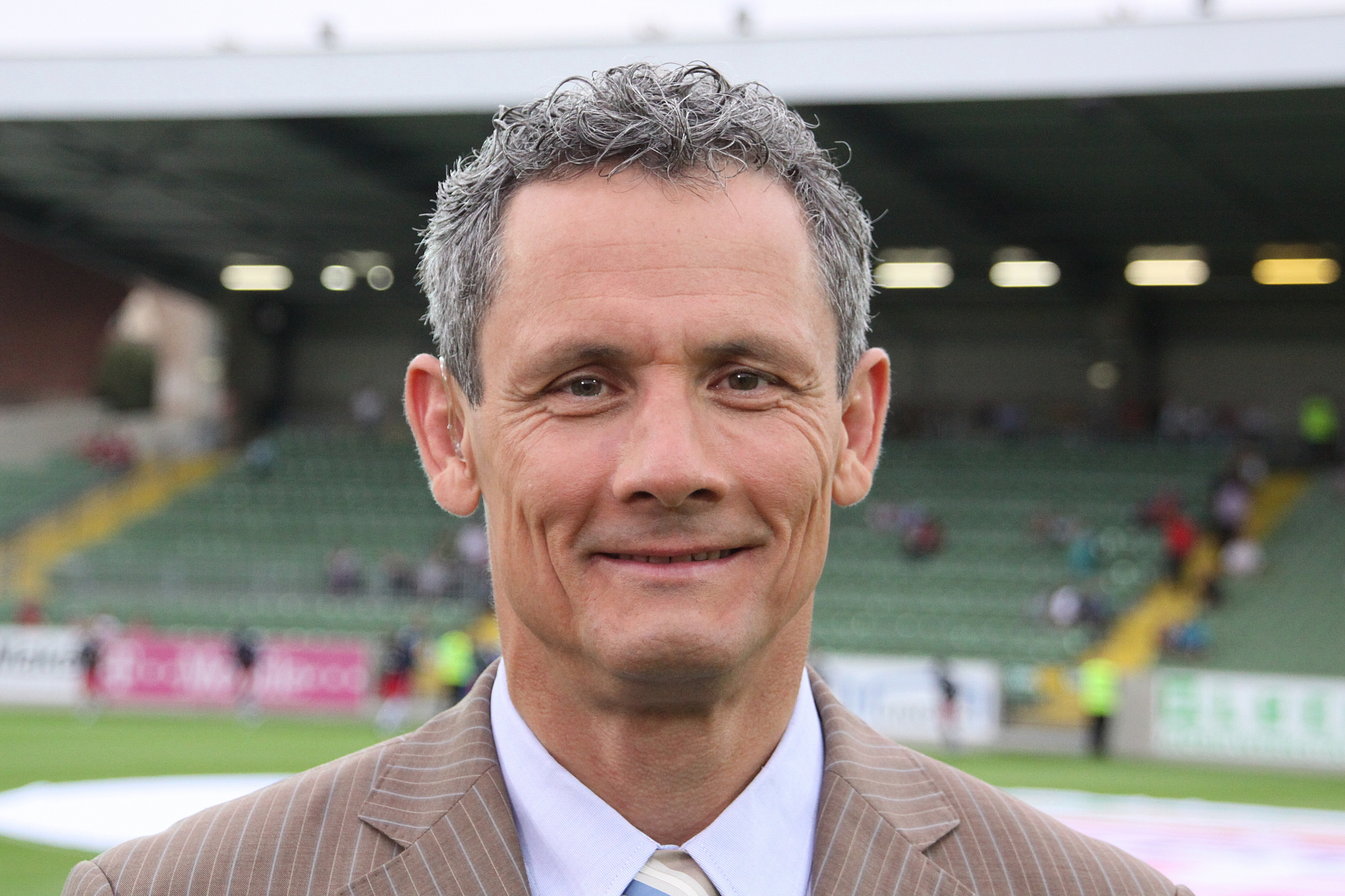 Heribert Weber, Sportdirektor - FC Admira Wacker Mödling (2)